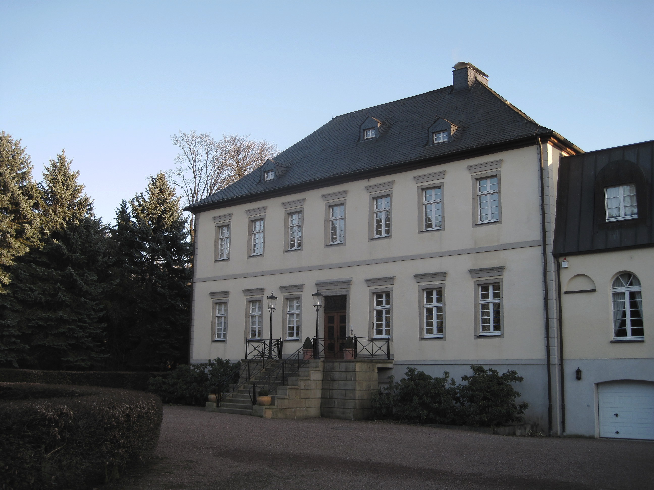 Ehemaliges Rittergut Edelburg in Hemer.